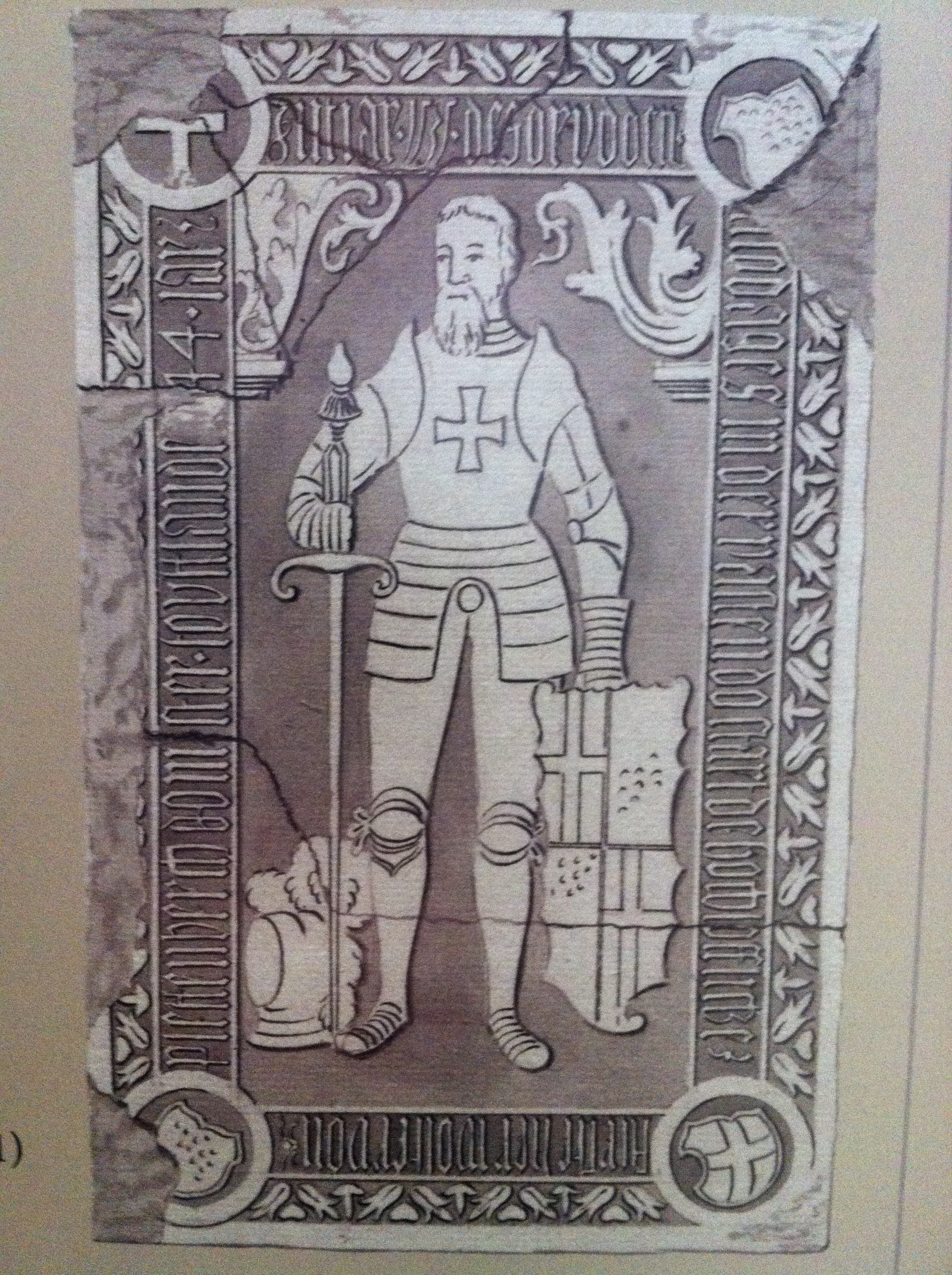 Paskaidrojošais attēls pie kapu plāksnes Cēsu baznīcā